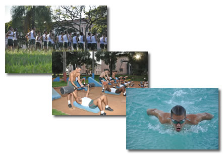 Treinamento Físico-Militar